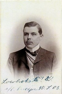 Porträtfotografie von Hermann Loerbroks